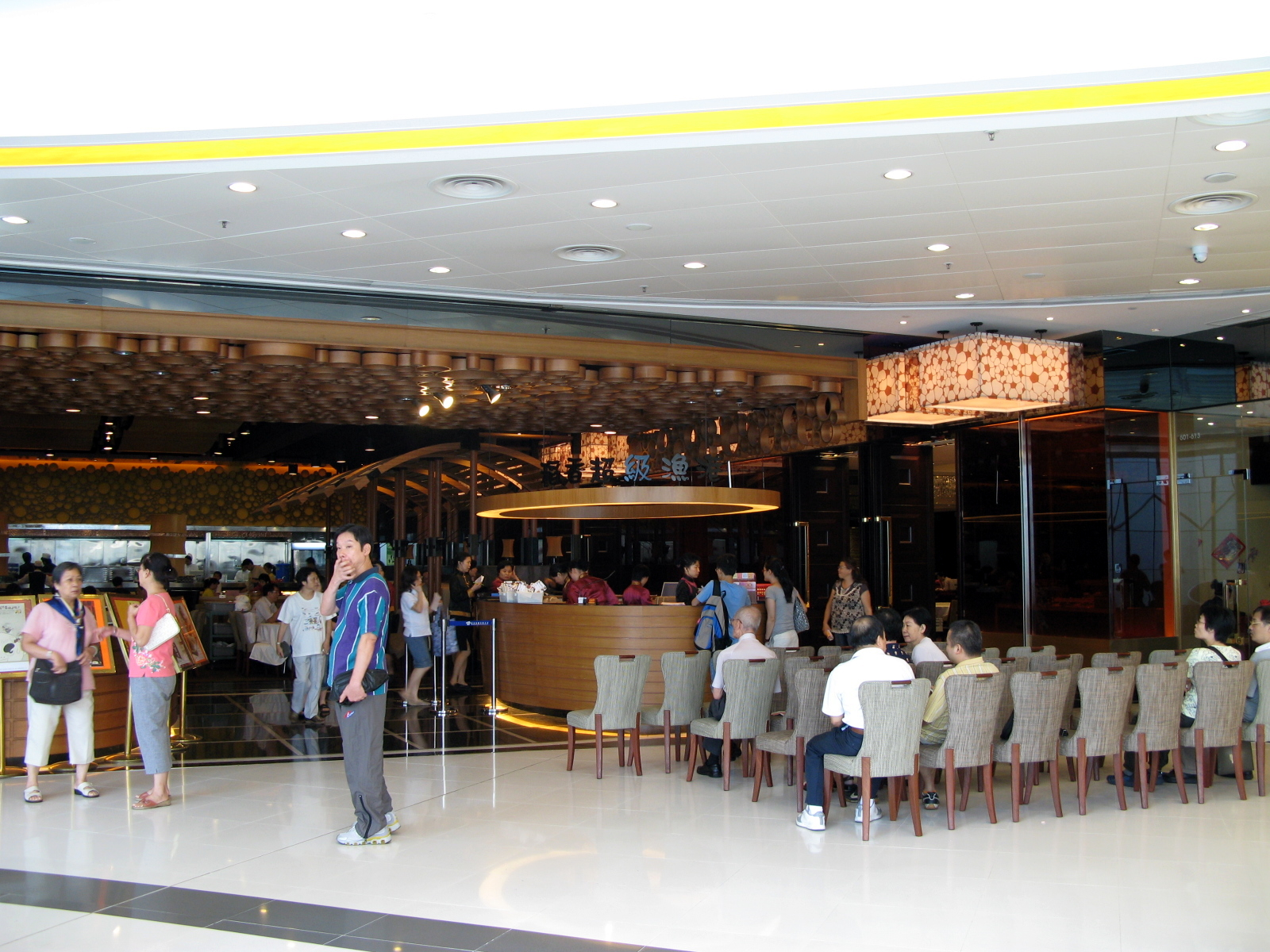 Pier88 in Tsuen Wan Plaza